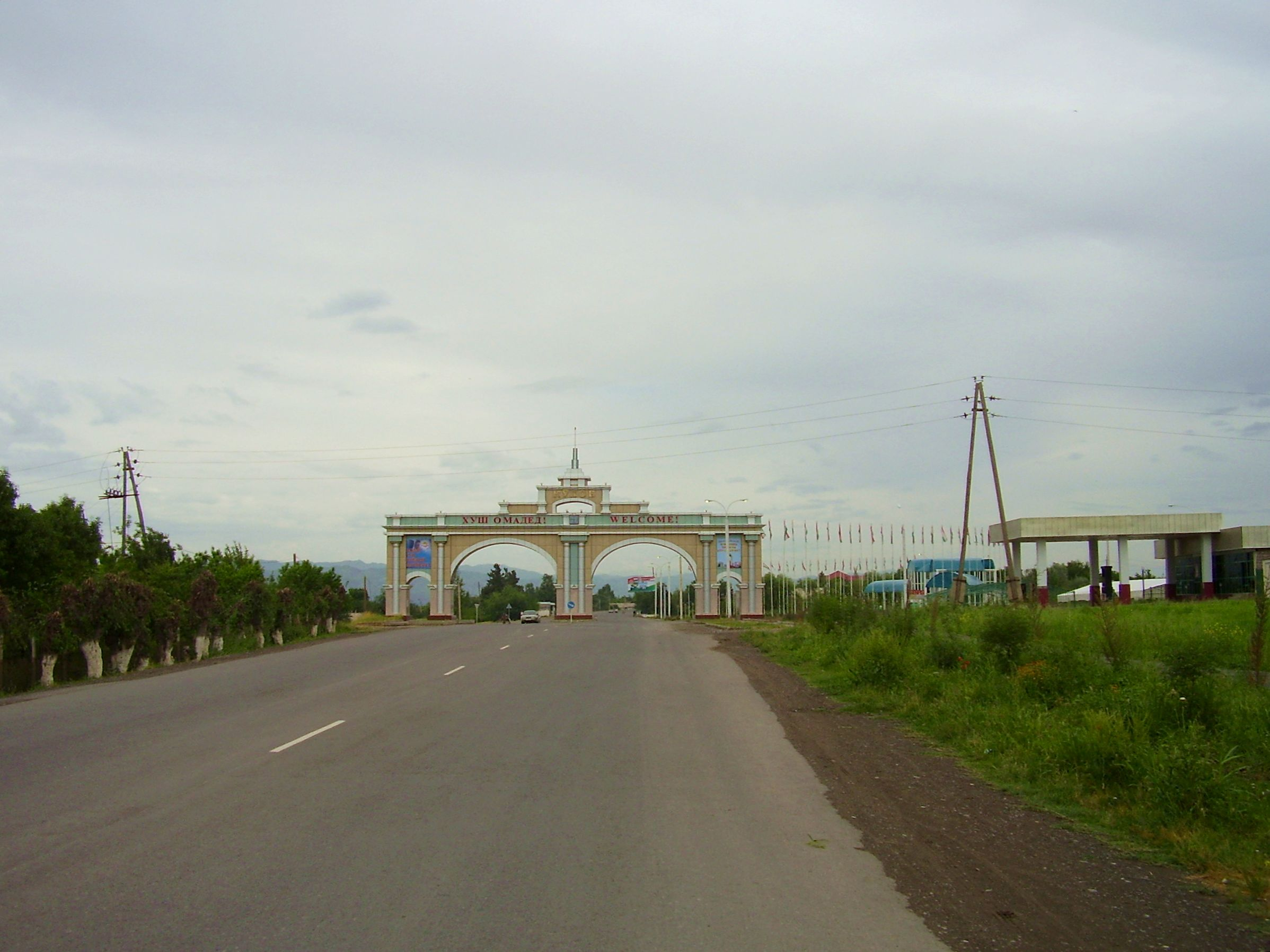 Kulob welcome